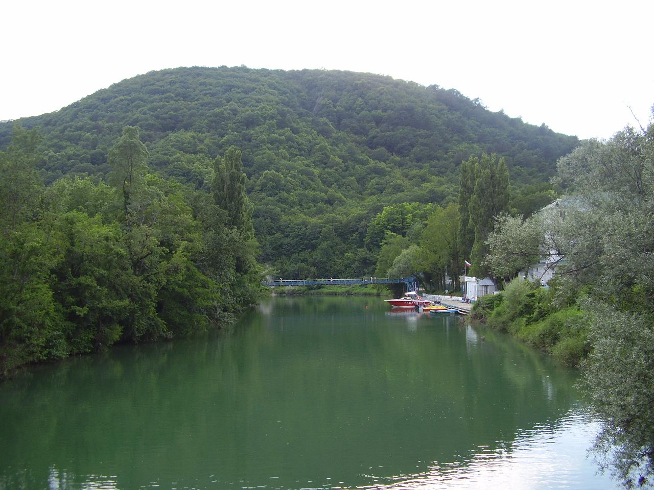 Река Вулан в Архипо-Осиповке